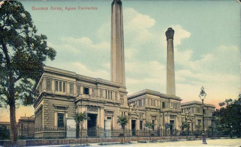 Vista de la Casa de Bombas, edificio que dotaba de agua corriente a Buenos Aires hasta la inauguración de la Planta San Martín, en Belgrano. Hoy es el Museo Nacional de Bellas Artes.